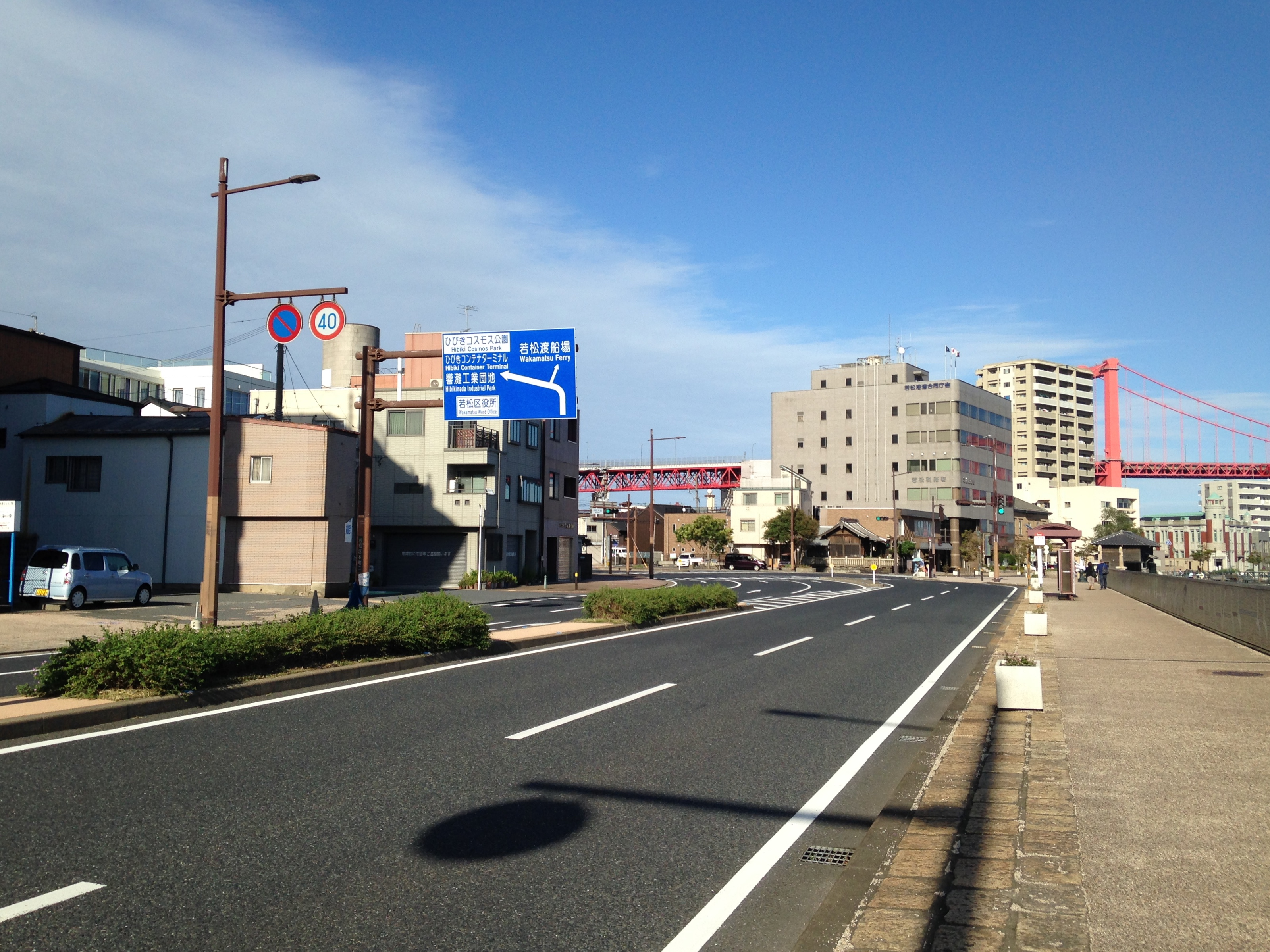 北九州港若松ふ頭付近の国道495号